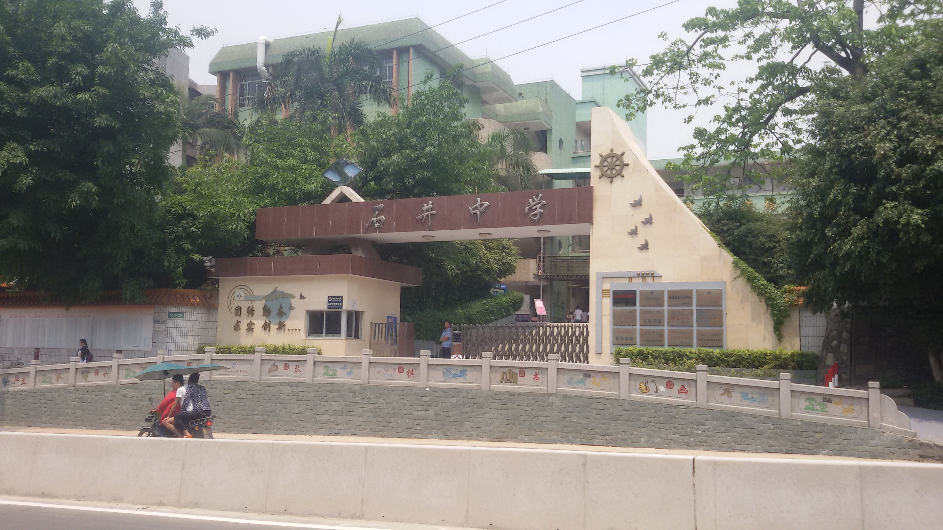 粵語: 白雲區石井中學嘅校区正门